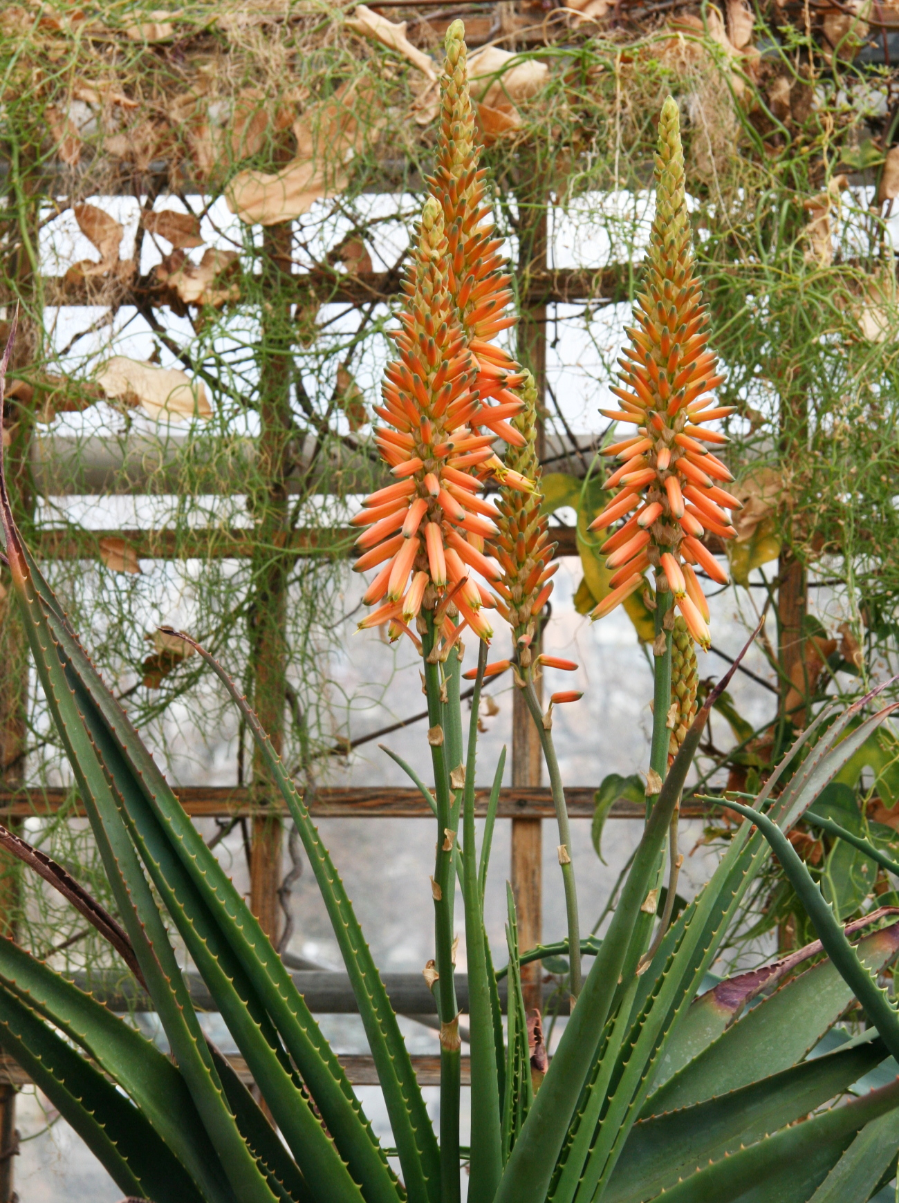 Aloe lutescens im Botanischen Garten Dresden